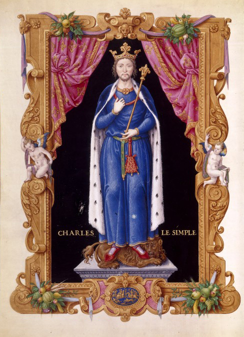 Charles III le simple selon Jean Du Tillet - Recueil des rois de France. Bibliothèque nationale de France. Peinture réalisée d'après la statue de l'église Saint-Fursy de Péronne.